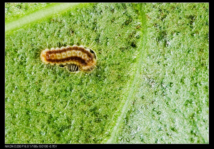 Histia flabellicornis ultima larva